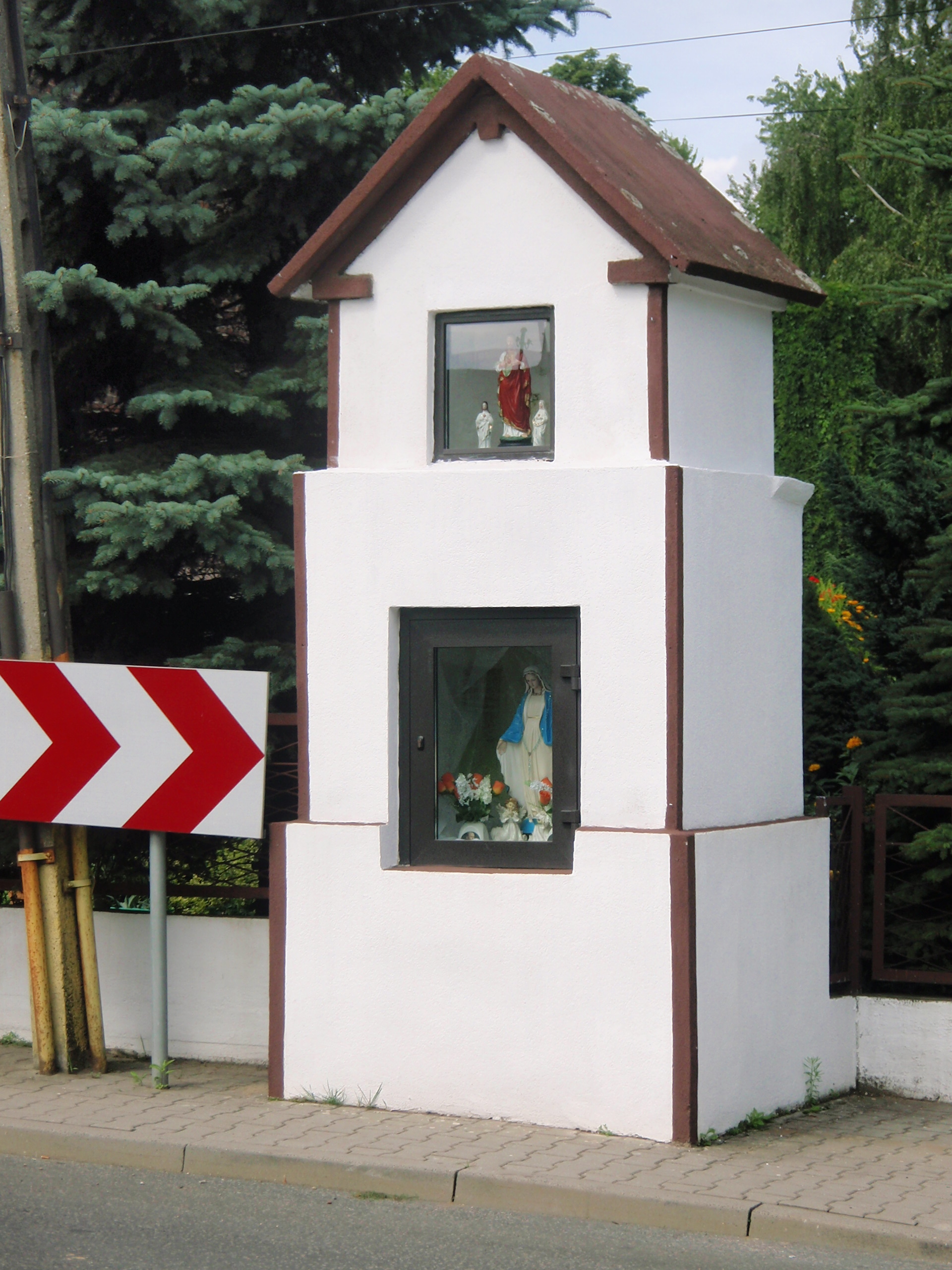 Kapliczka na skrzyżowaniu ul. 1-go maja i Sienkiewicza w Bobrownikach (woj. śląskie)